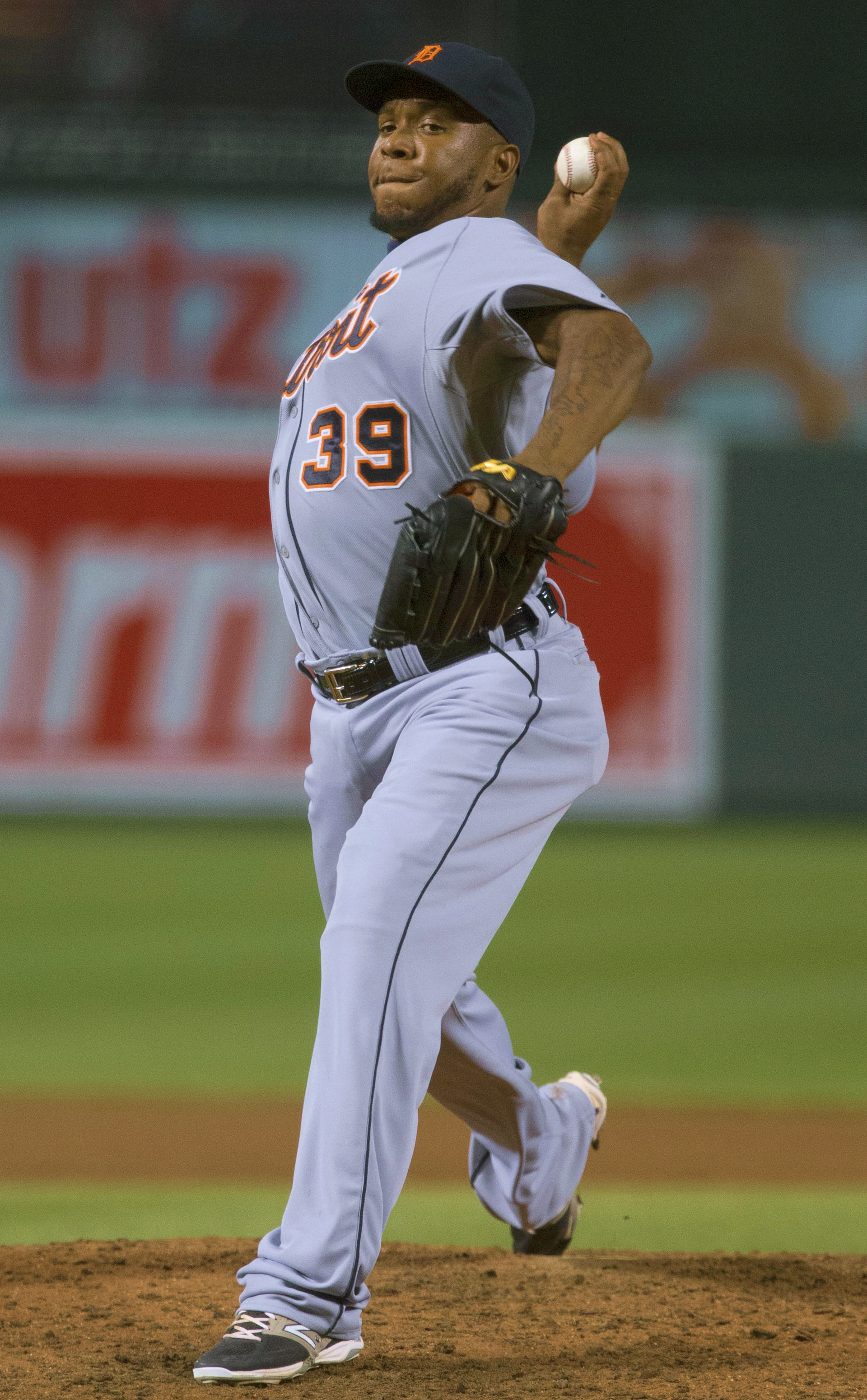 Neftalí Feliz